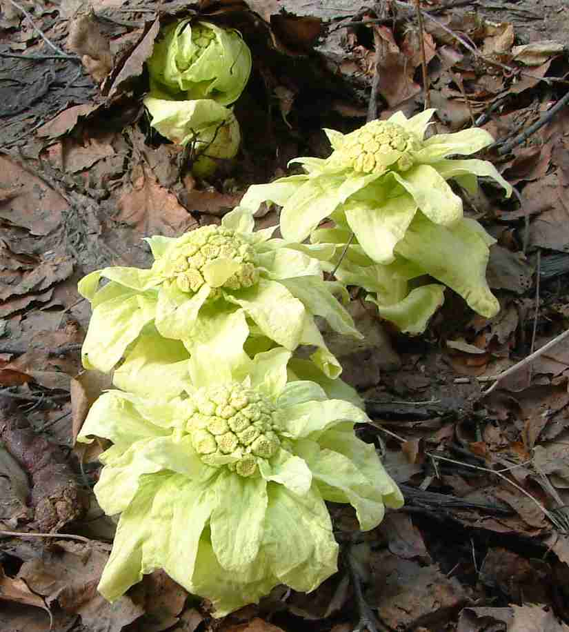 Petasites japonicus (フキ) taken in Hokkaido, Japan